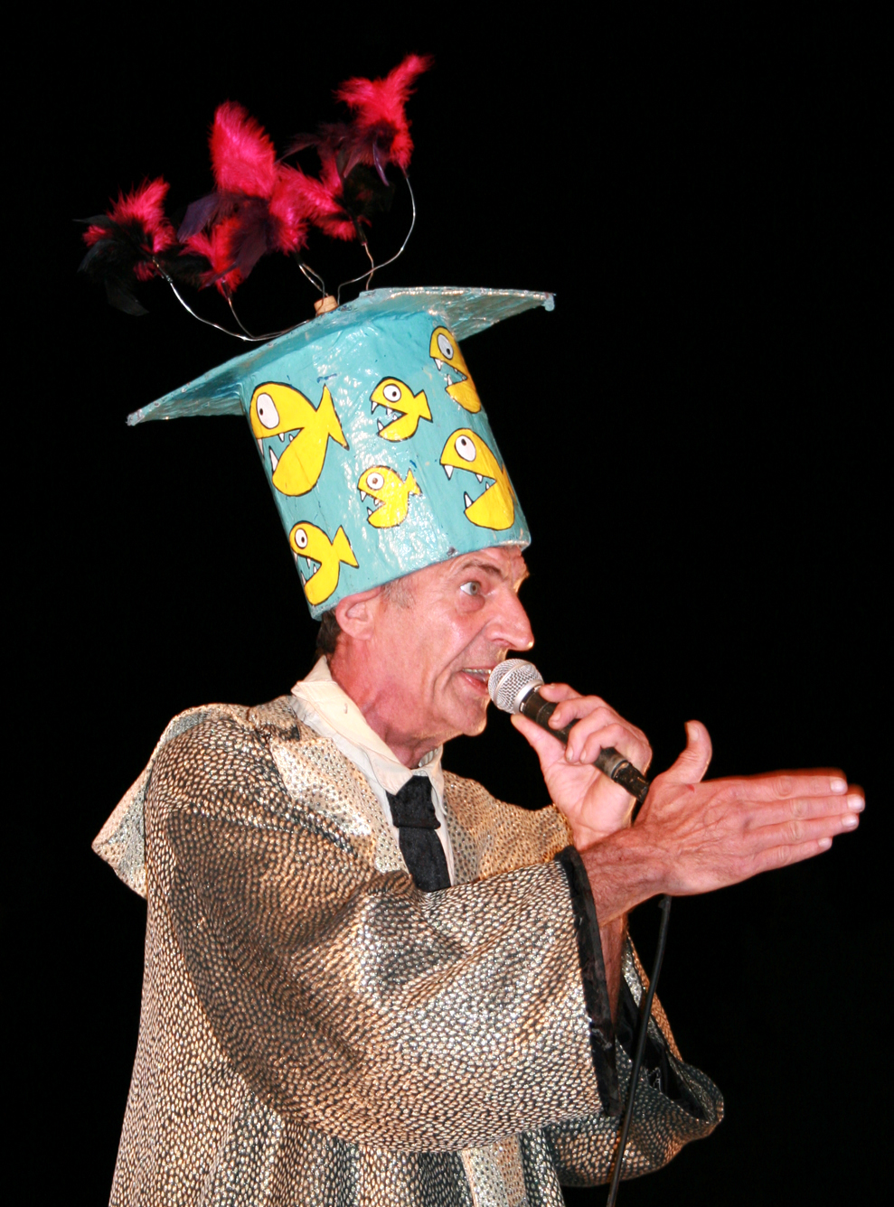 « Carton », chanteur de Raoul Petite, groupe de rock agricole sophistiqué, en concert le 28 avril 2007 à L'Isle-sur-la-Sorgue, Vaucluse, France